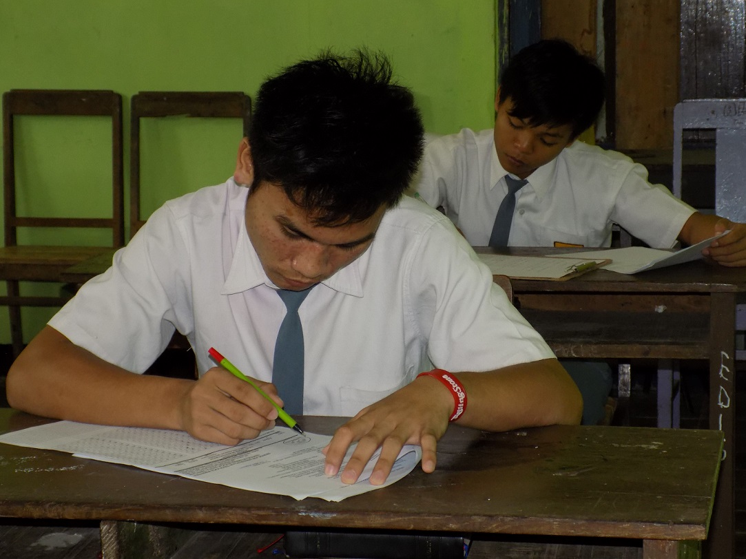 KBM menggunakan KTSP